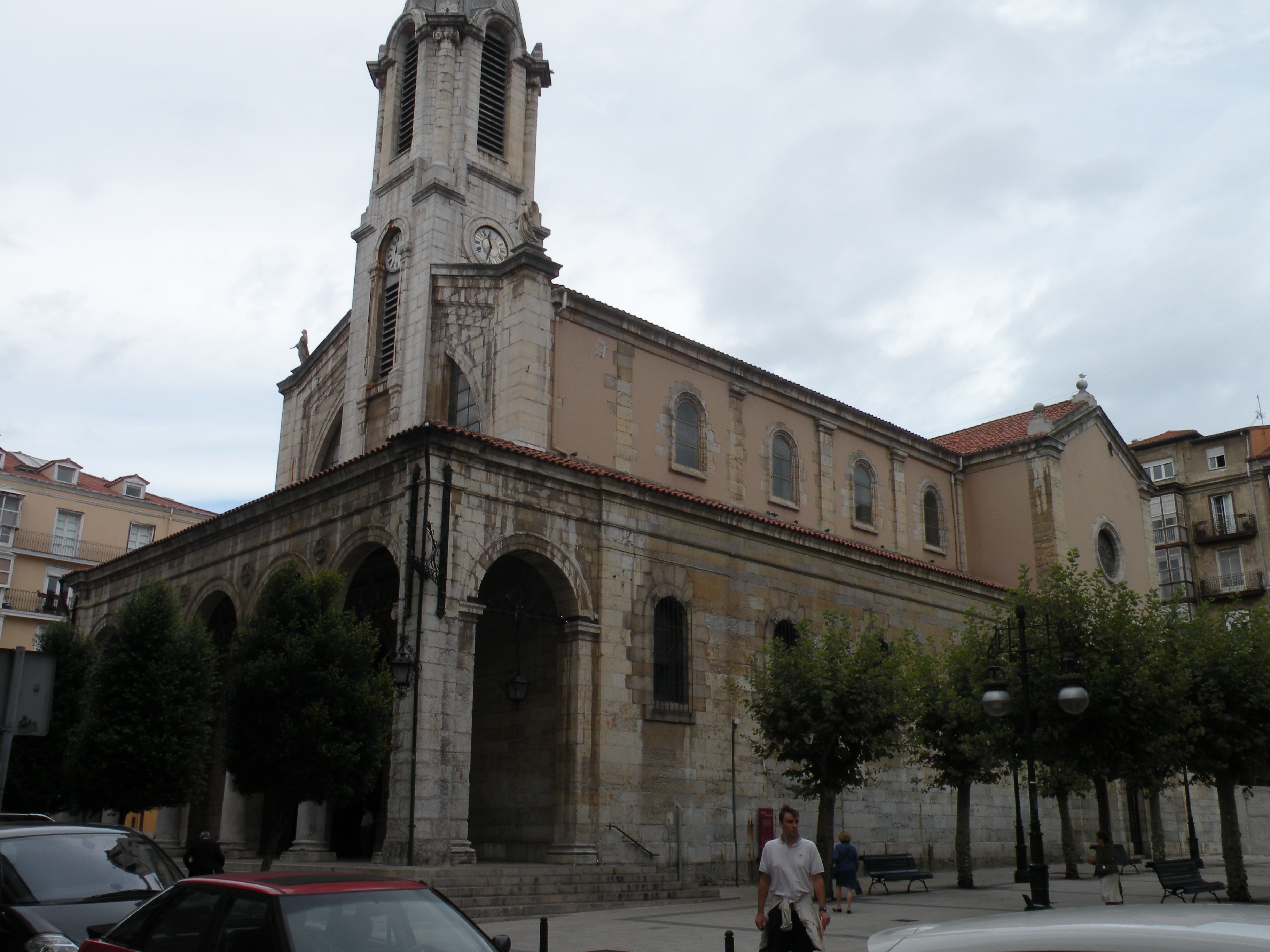 Situada en el casco antiguo de Santander